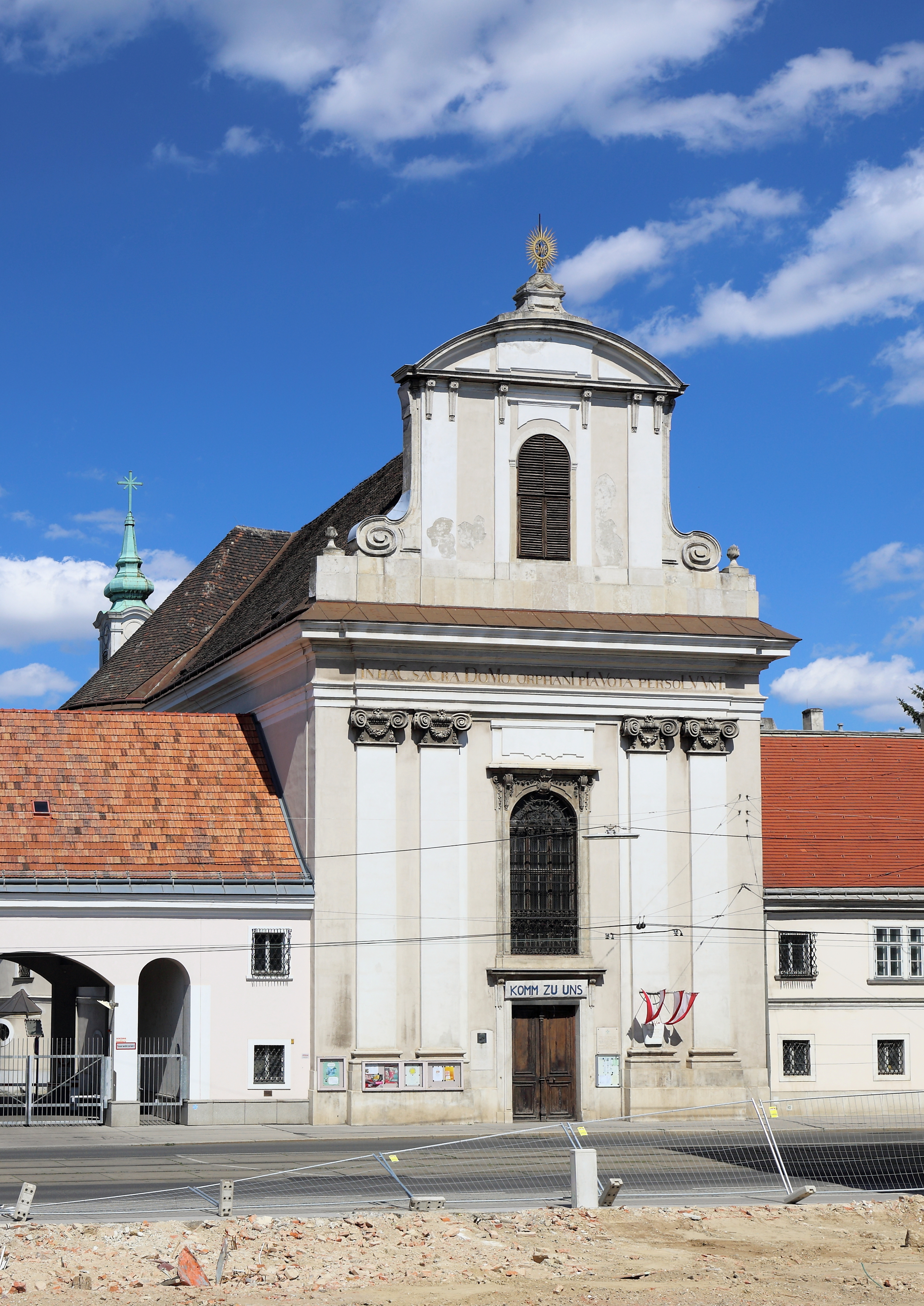 Die röm.-kath. Pfarrkirche Mariä Geburt am Rennweg im 3. Wiener Gemeindebezirk Landstraße.Sie wurde 1768 nach Plänen des Architekten Thaddäus Karner als Waisenhauskirche errichtet und am 7. Dezember 1768 durch Fürsterzbischof Christoph Anton Graf Migazzi geweiht, wobei die Inneneinrichtung erst um 1775 fertiggestellt wurde. Im Jahr 1783 wurde die Kirche zur Pfarrkirche erhoben und nach Verlegung des Waisenhauses auf den Alsergrund verlor die Kirche 1785 ihre Funktion als Waisenhauskirche. Sie erhielt jedoch den Status einer Garnisonskirche, nachdem man das ehemalige Waisenhaus 1797 zu einer Artilleriekaserne adaptierte.